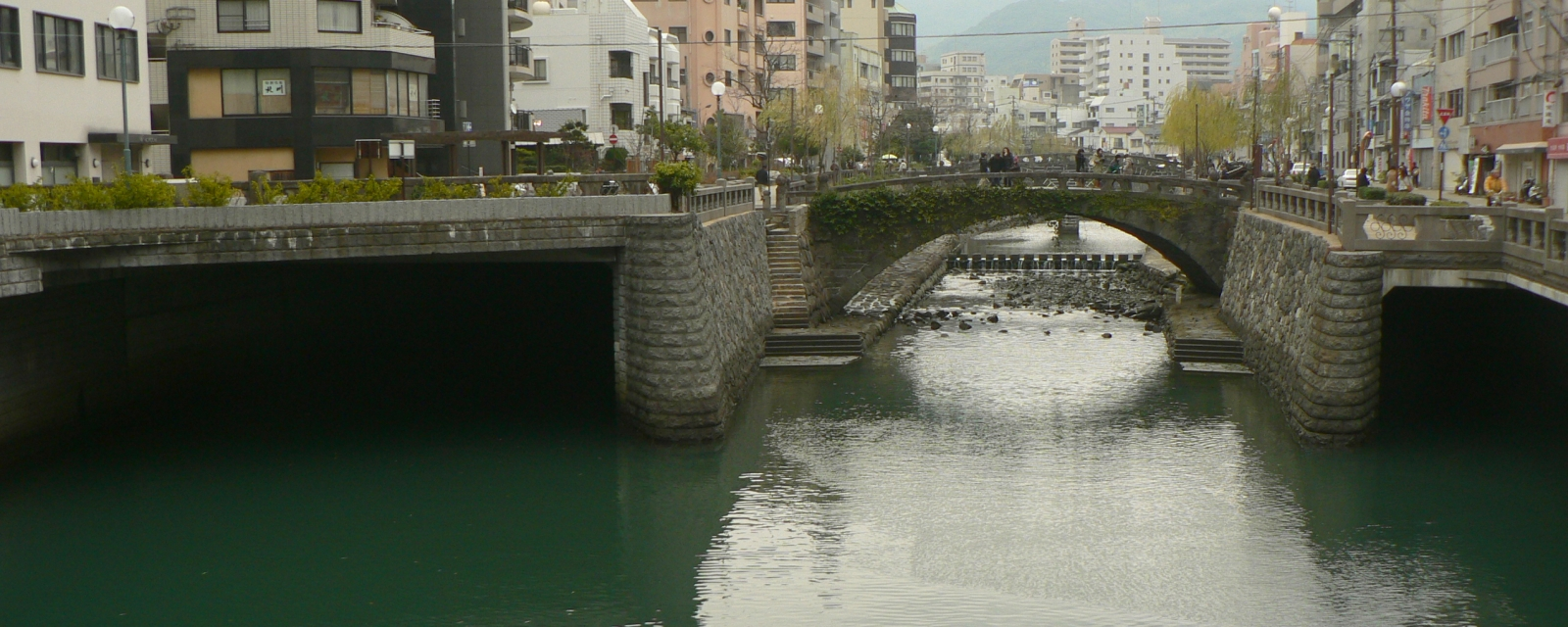 長崎市の中島川。眼鏡橋の辺りでは両岸の地下に暗渠式のバイパス水路が設けられている。